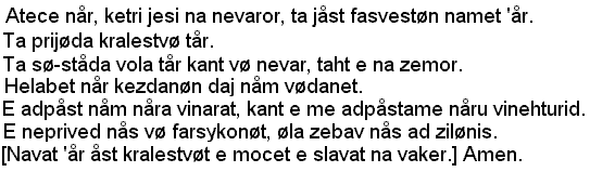 Otčenáš v seversku